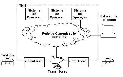 Rede TMN